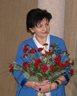 Iwona Sadowska (ur. 24 kwietnia 1963 w Żyrardowie) - polska reżyserka filmów dokumentalnych, dziennikarka współpracująca z TVP